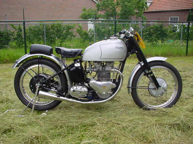 Triumph 1951 Grand Prix.